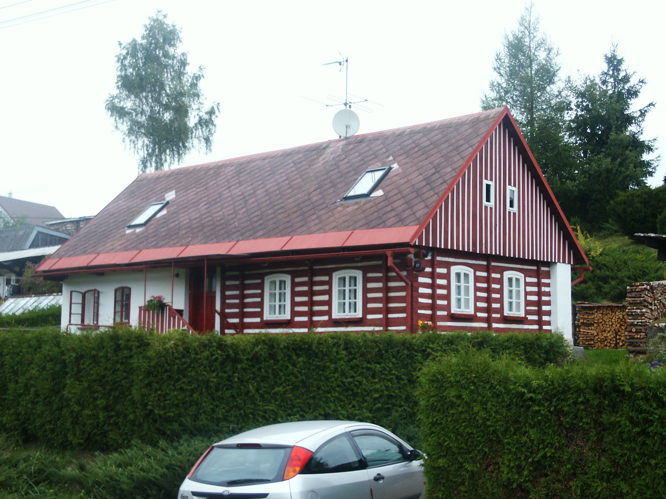 Dolní Olešnice - dům č.p.81